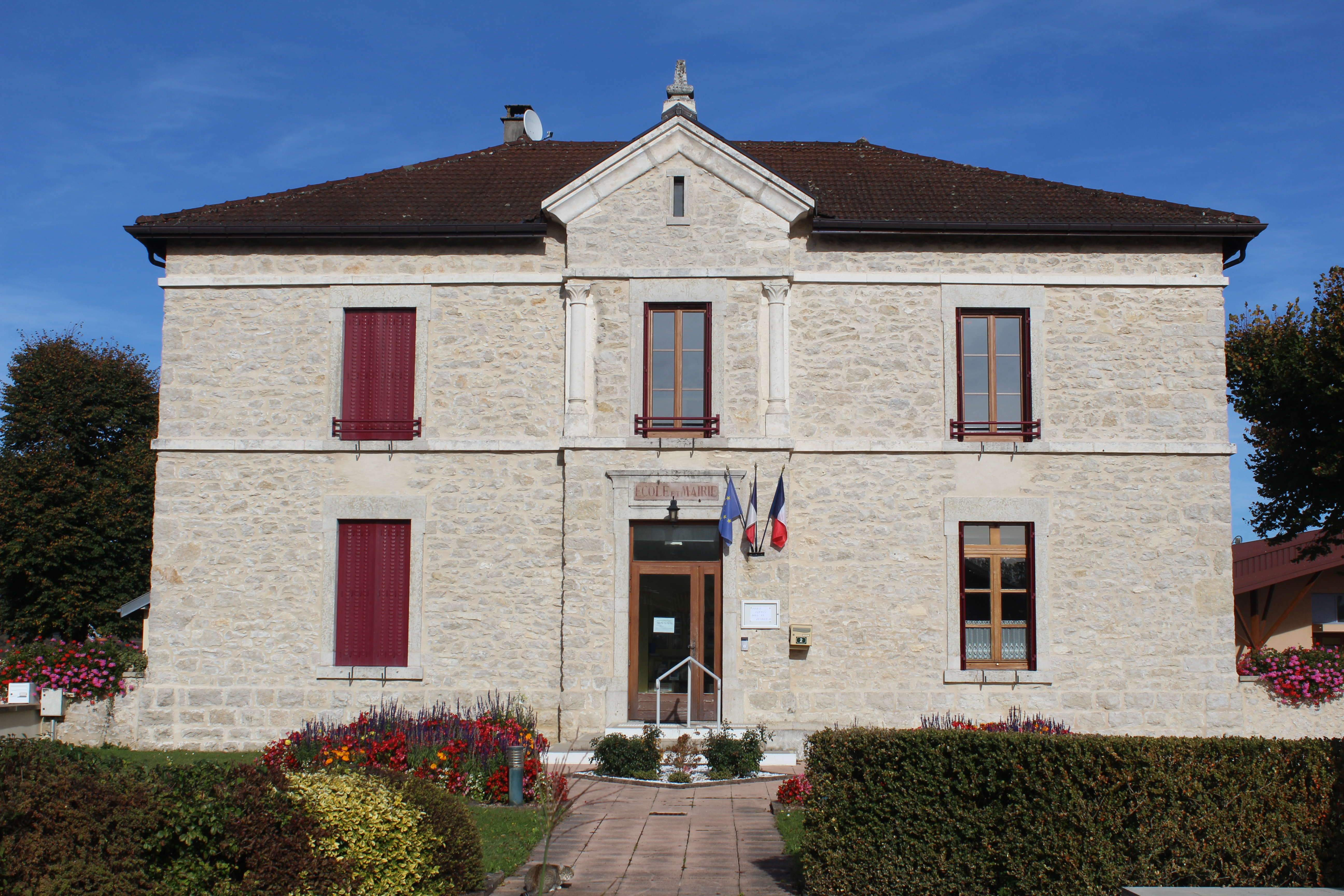 Mairie de Cize, Ain.